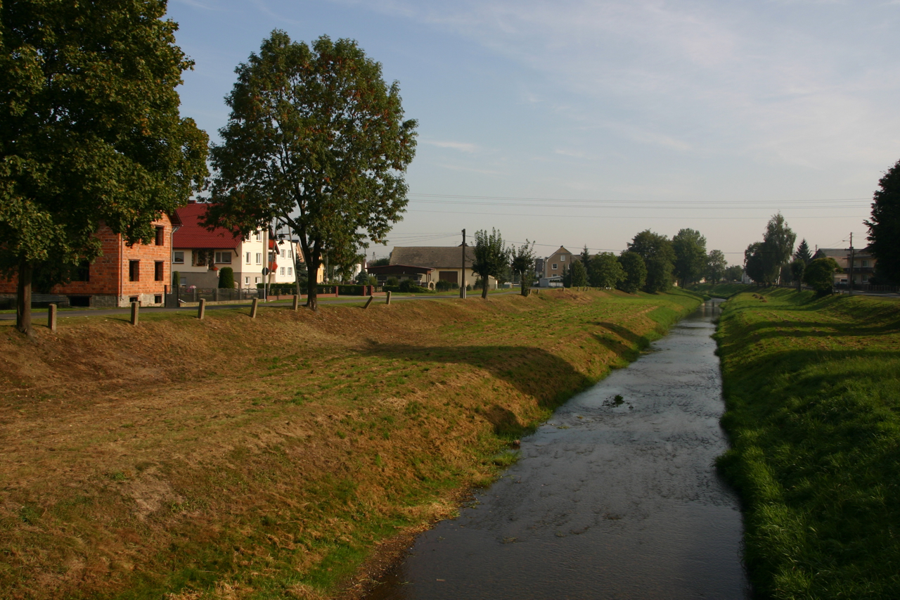 Kierpień (dodatkowa nazwa w j. niem. Kerpen) – wieś w Polsce położona w województwie opolskim, w w powiecie prudnickim, w gminie Głogówek.